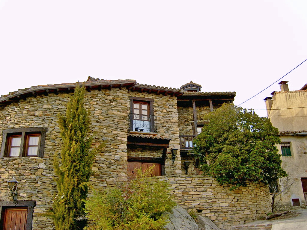 Sujet:Typesche Baustil aus där Géigend Source:Ex-Commons Bild verschafft vum User:Cornischong